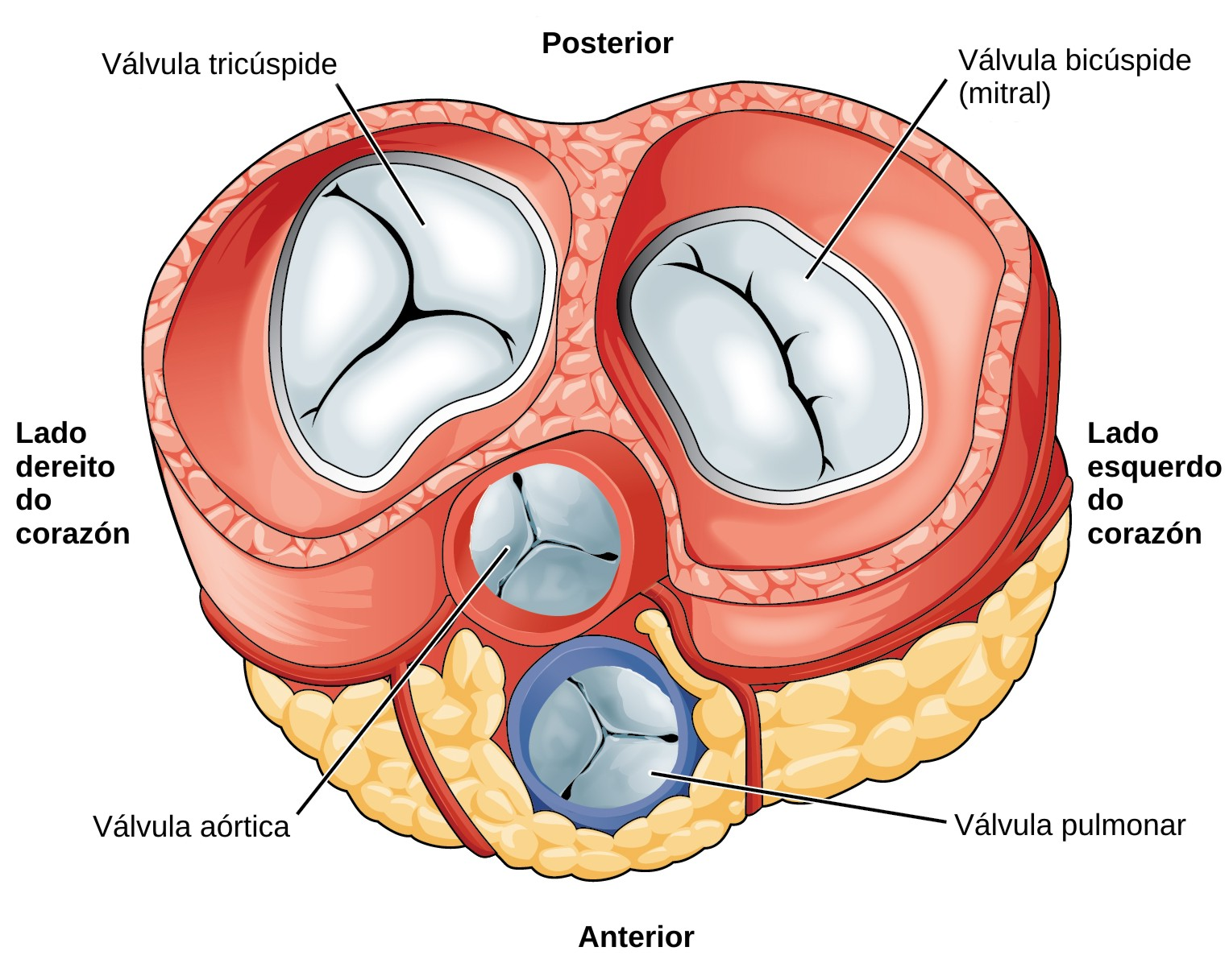 Debuxo dun corte do corazón mostrando as válvulas